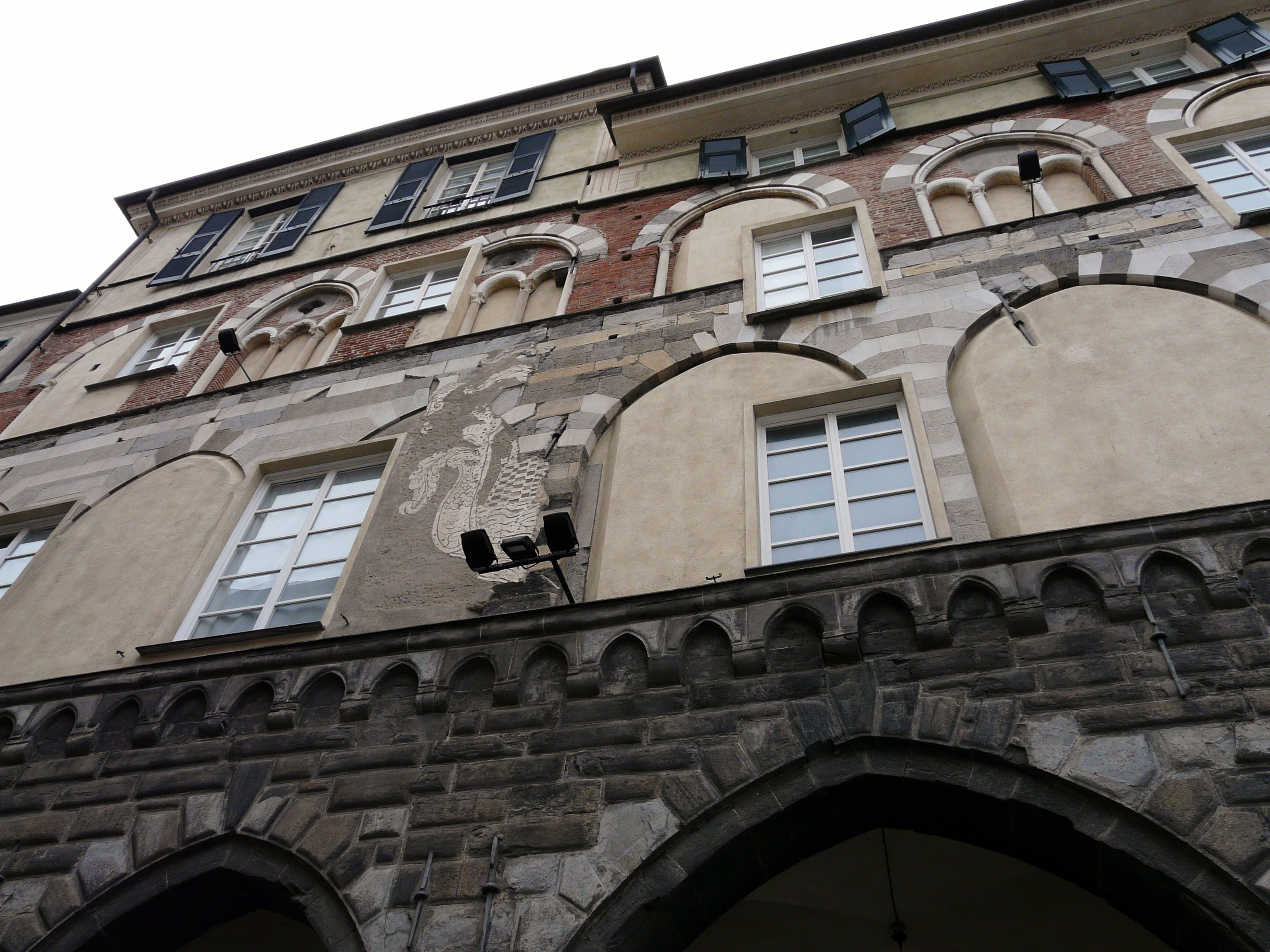 Palazzo "dei portici neri" di Chiavari, Liguria, Italia